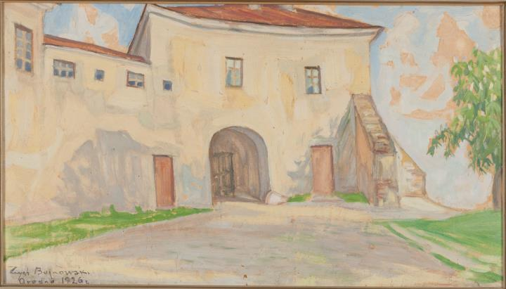 Карціна з выяваю Старога замка часоў Стэфана Баторыя ў горадзе Гродна мастака Зыгмунта Буйноўскага, створаная ў 1926 годзе.